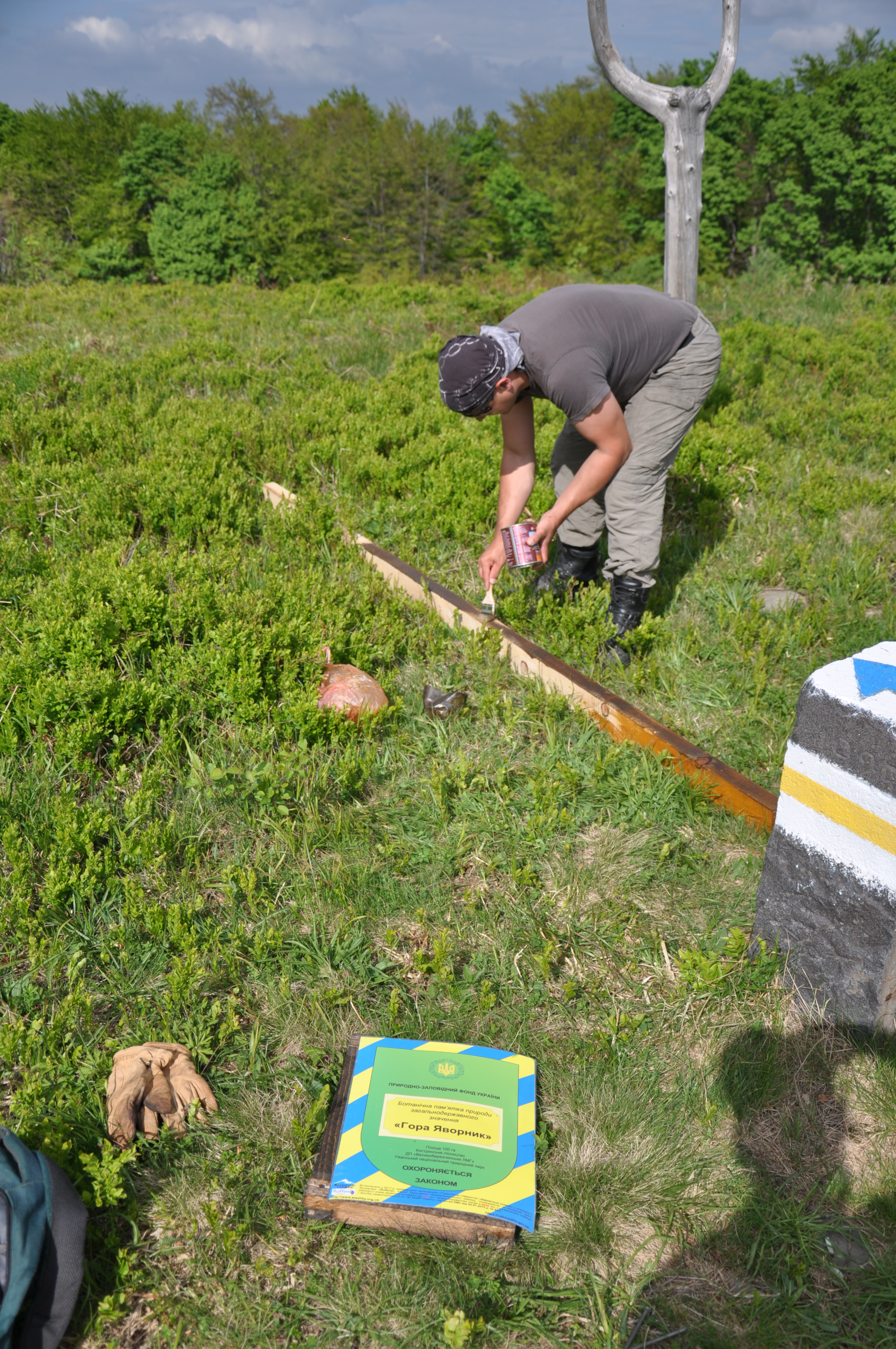 Карпатські стежки